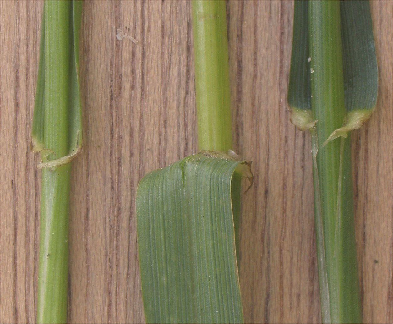 (Westerwoldsraaigras tongetje en oortjes) Lolium multiflorum